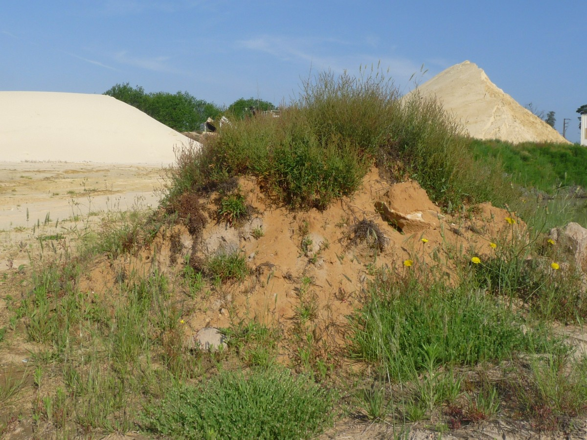 Carrière de sable du Maine-au-Loup, Combiers, Charente, France. Sable détritique du Tertiaire